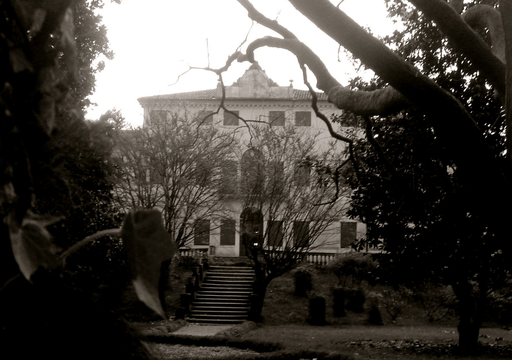 Brugnera (Pordenone): Villa Varda, edificio padronale.